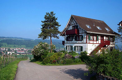 Riegelhaus Guldenberg Embrach